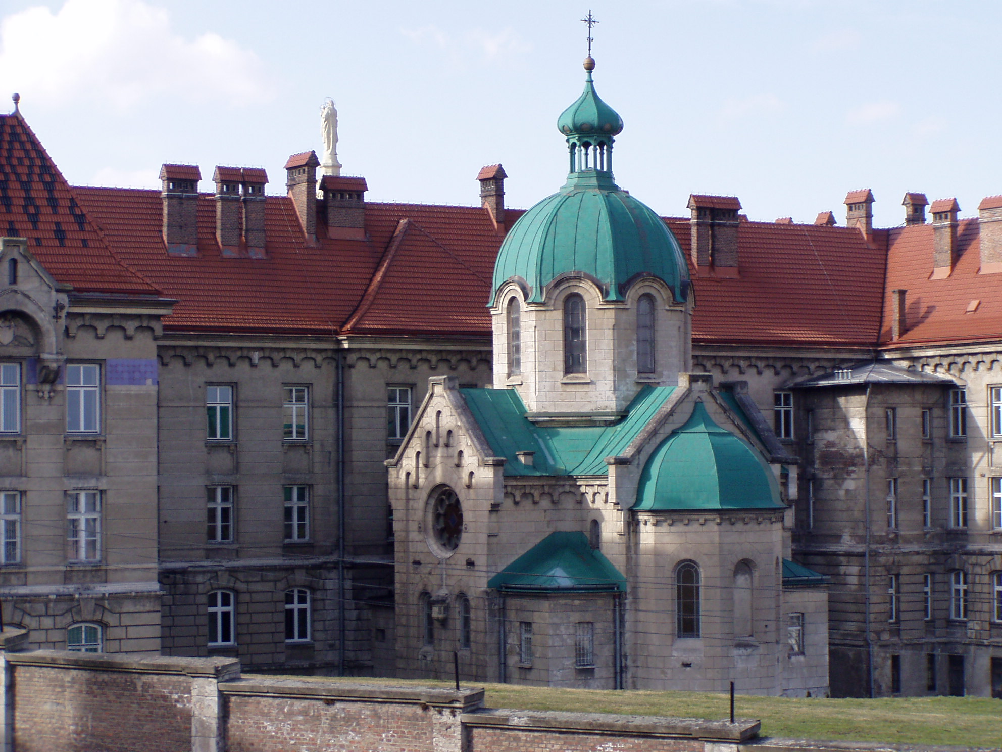 Budova Řeckokatolického semináře v Przemyślu, Polsko